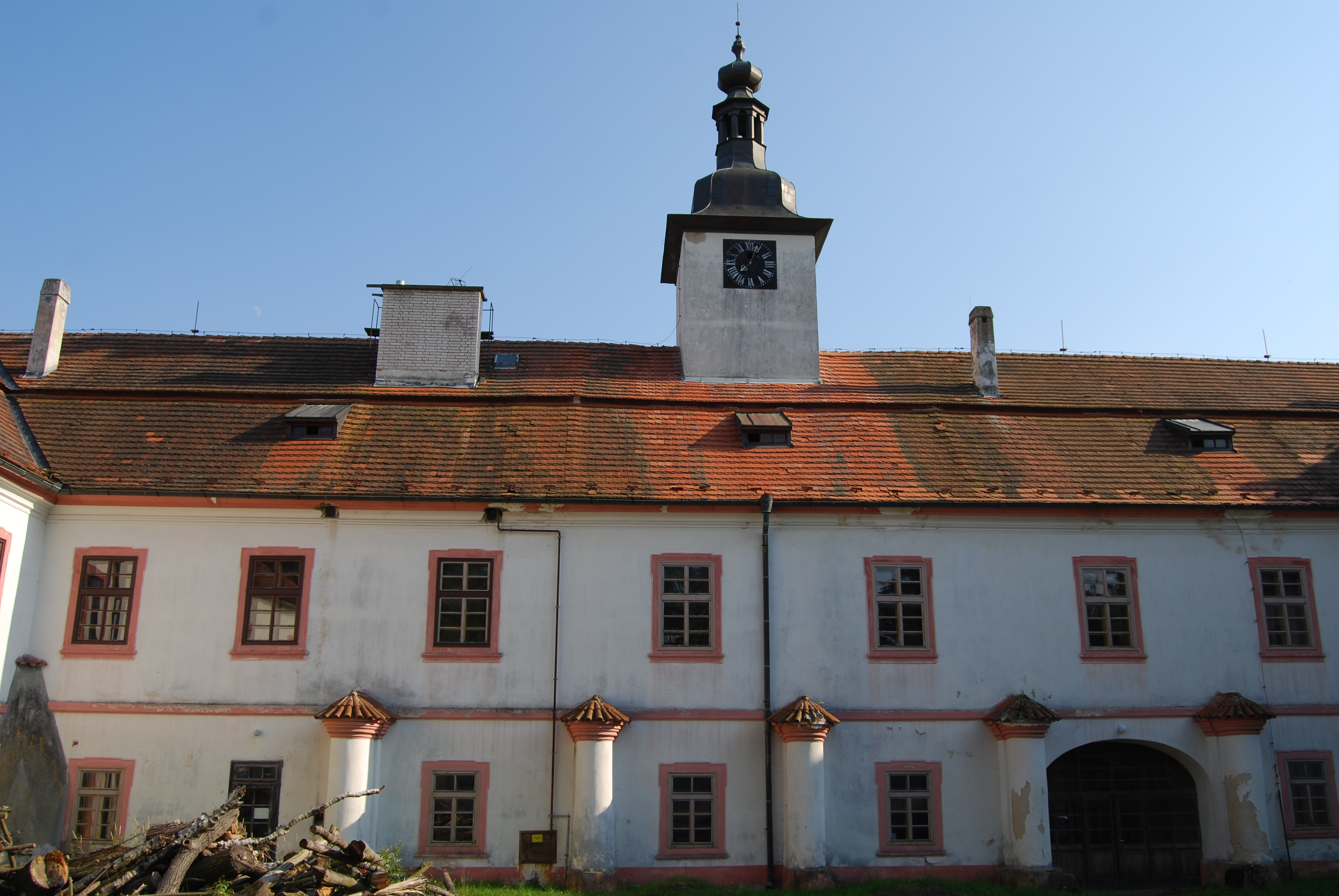 Zámek Nadějkov přímo v obci, poblíž kostela na náměstí. Obec Nadějkov v okrese Tábor v Jihočeském kraji. Česká republika.